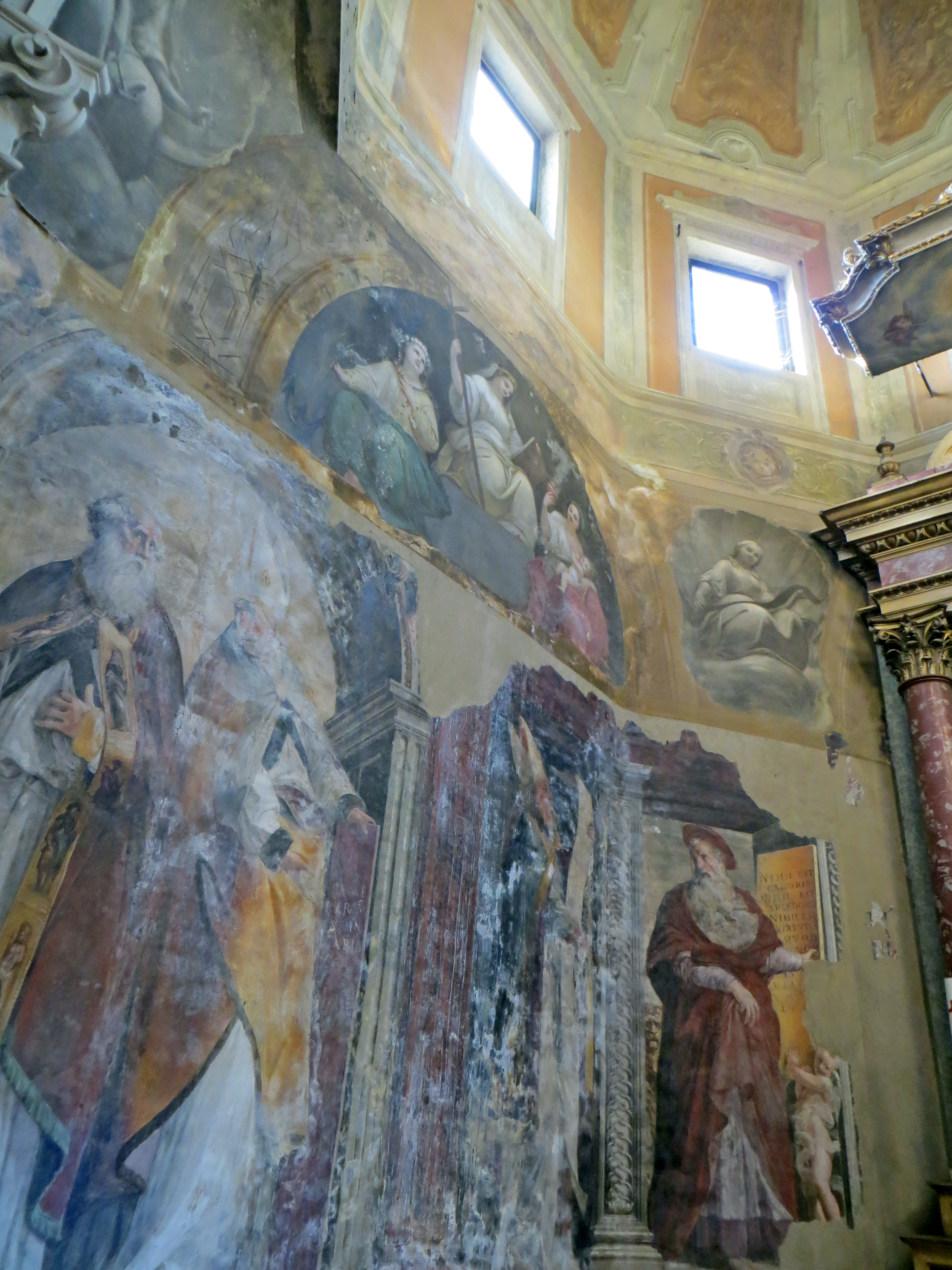 Collegiata di San Bartolomeo Apostolo (Busseto) - cappella della Beata Vergine della Concezione